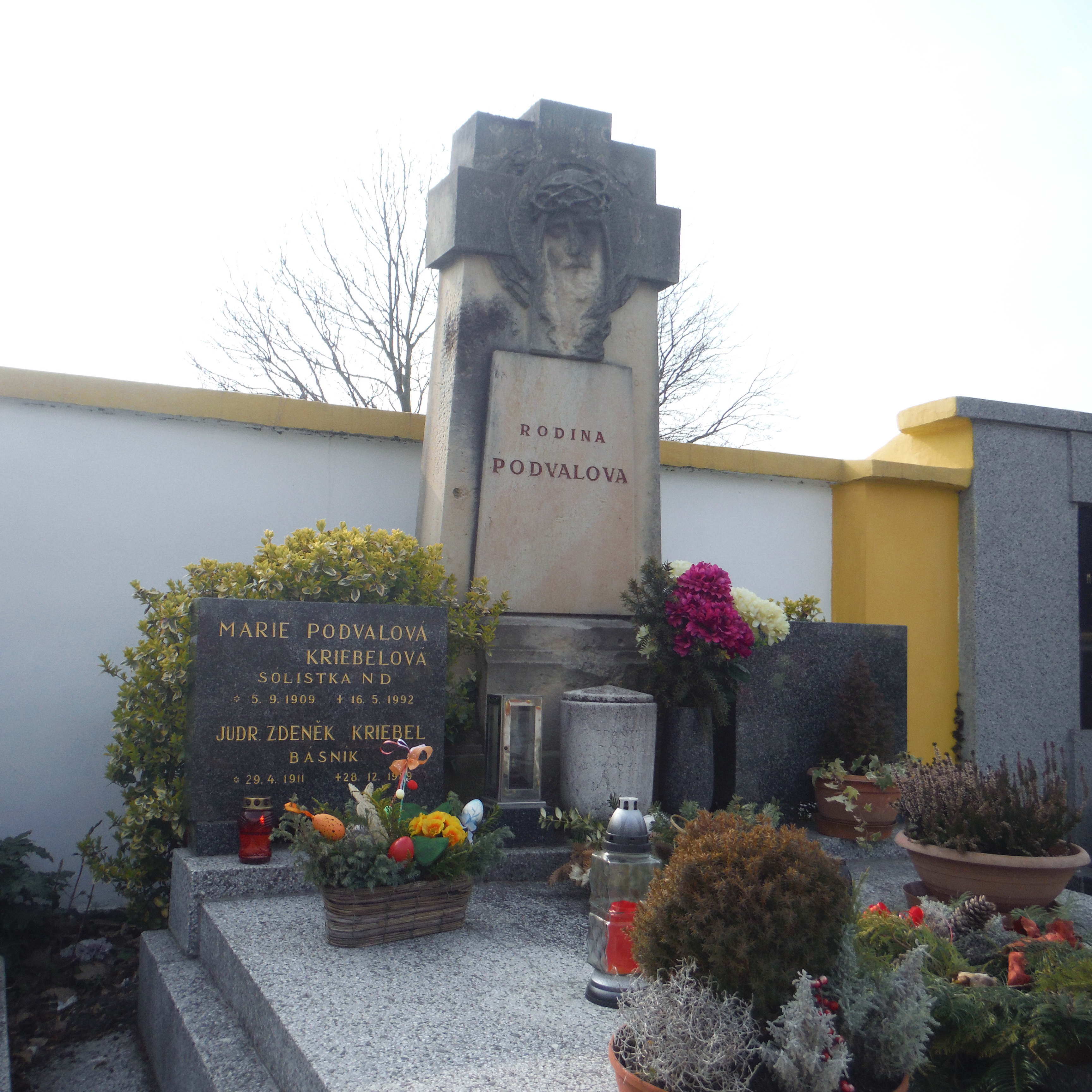 HROB